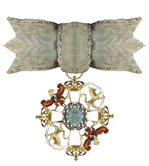 Eogen tekening naar Deens voorbeeld in Rosenborg Robert Prummel